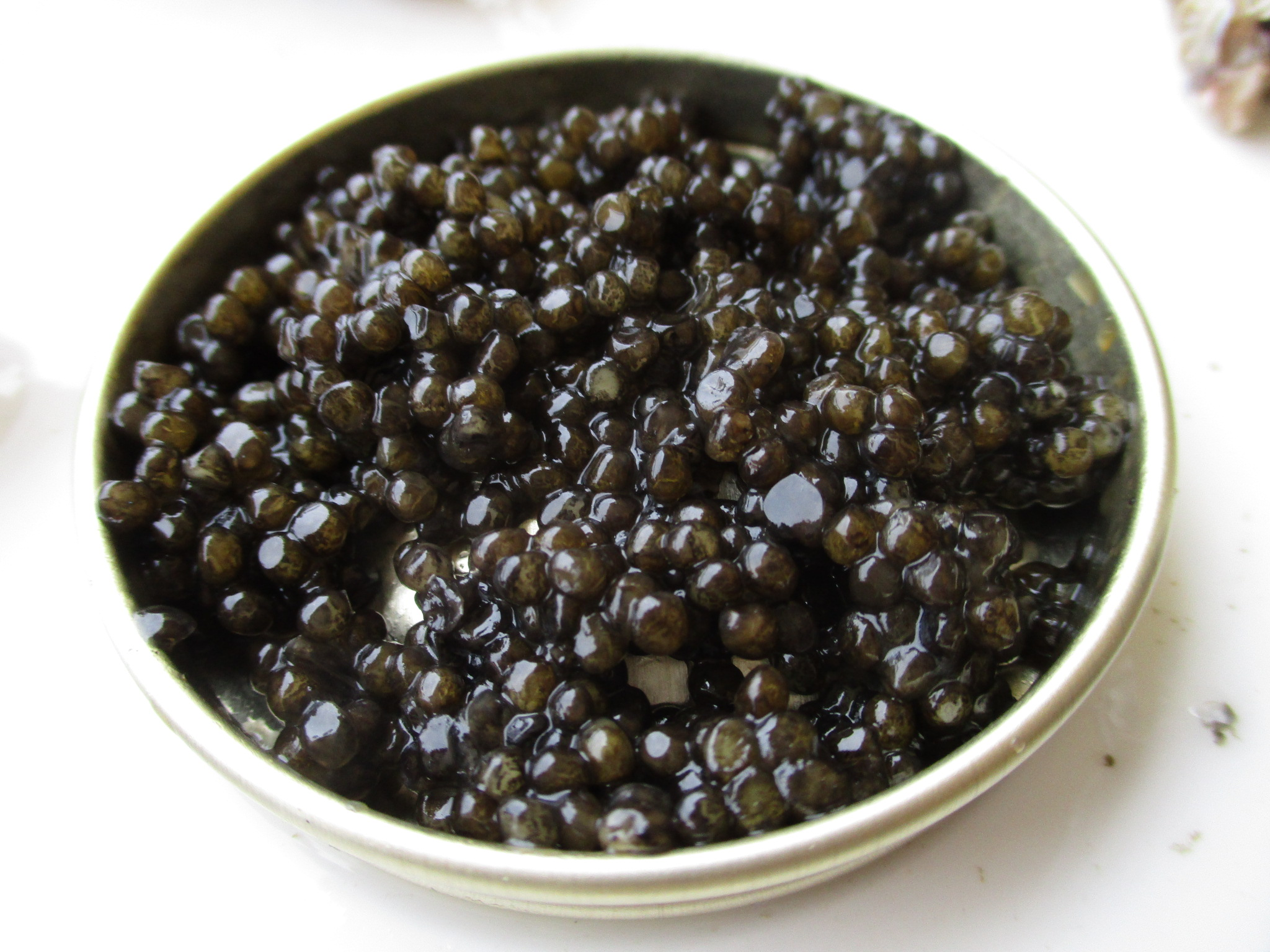 Caviar